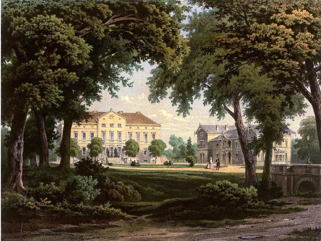 Schloss Quittainen, Lithografie aus dem 19. Jahrhundert